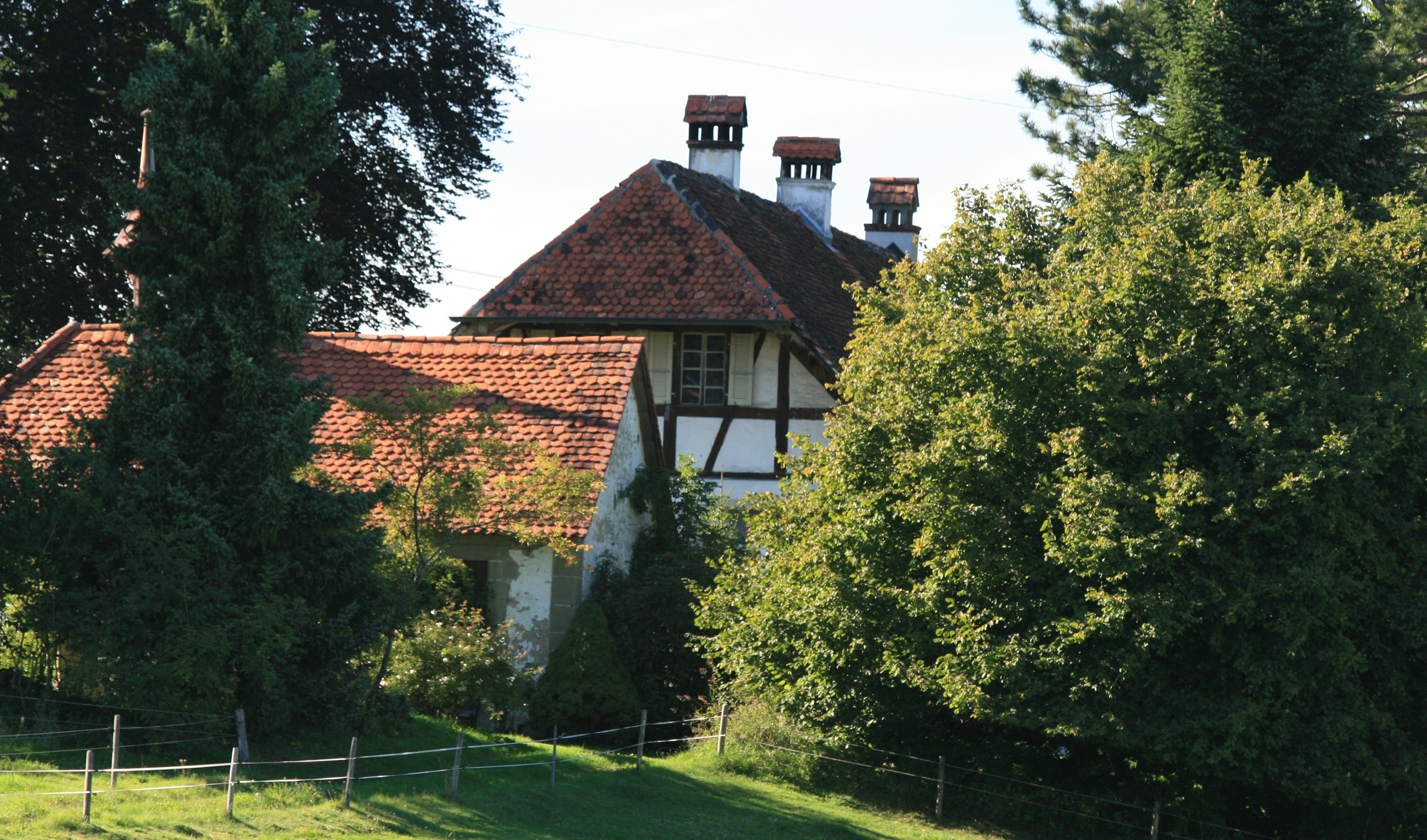 Herrenhaus im Weiler Römerswil mit der St.Philippus-Kapelle, Gemeinde St. Ursen, Kanton Freiburg, Schweiz